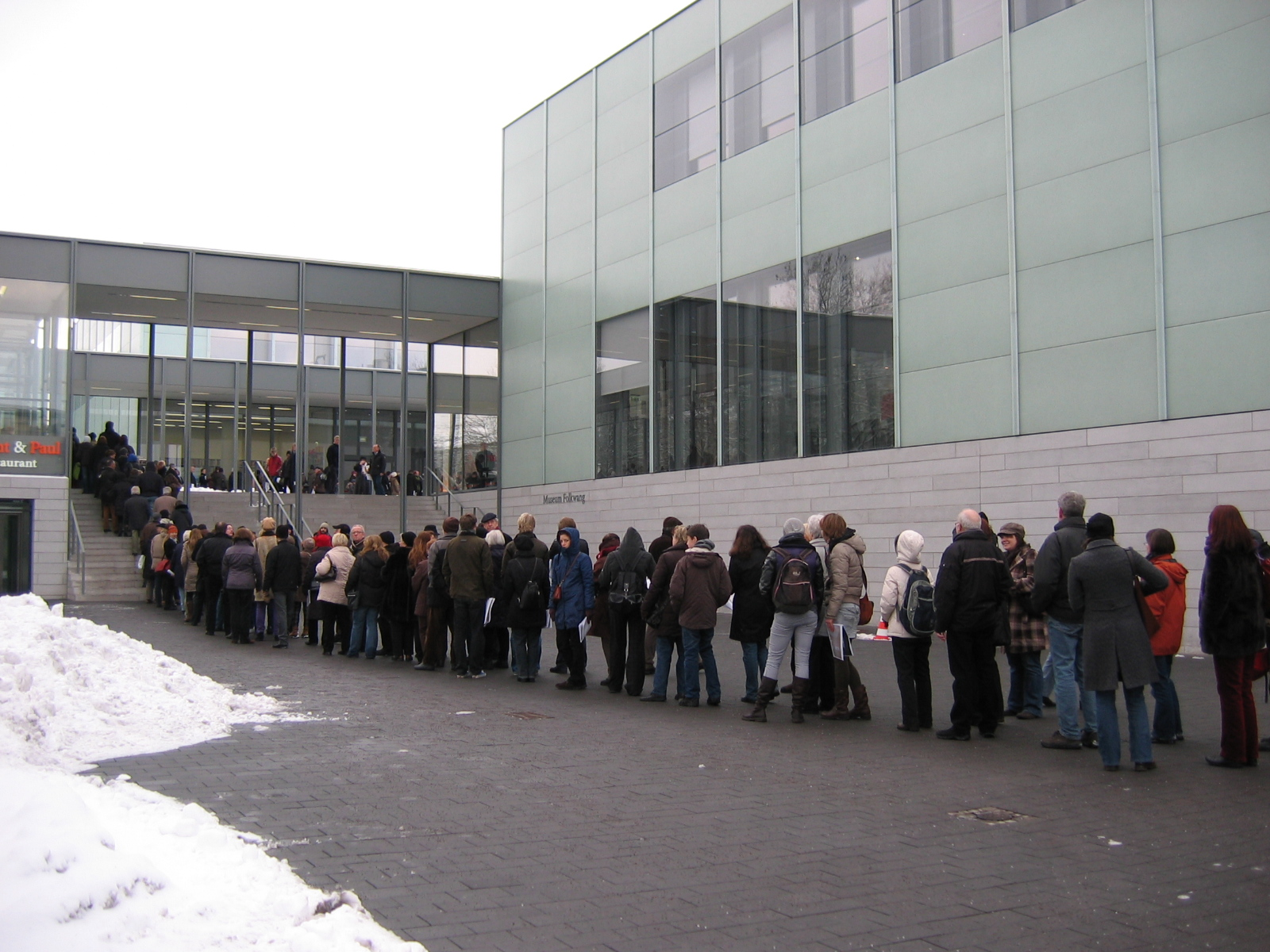 Besucher am Eröffnungswochenende des Museum Folkwang